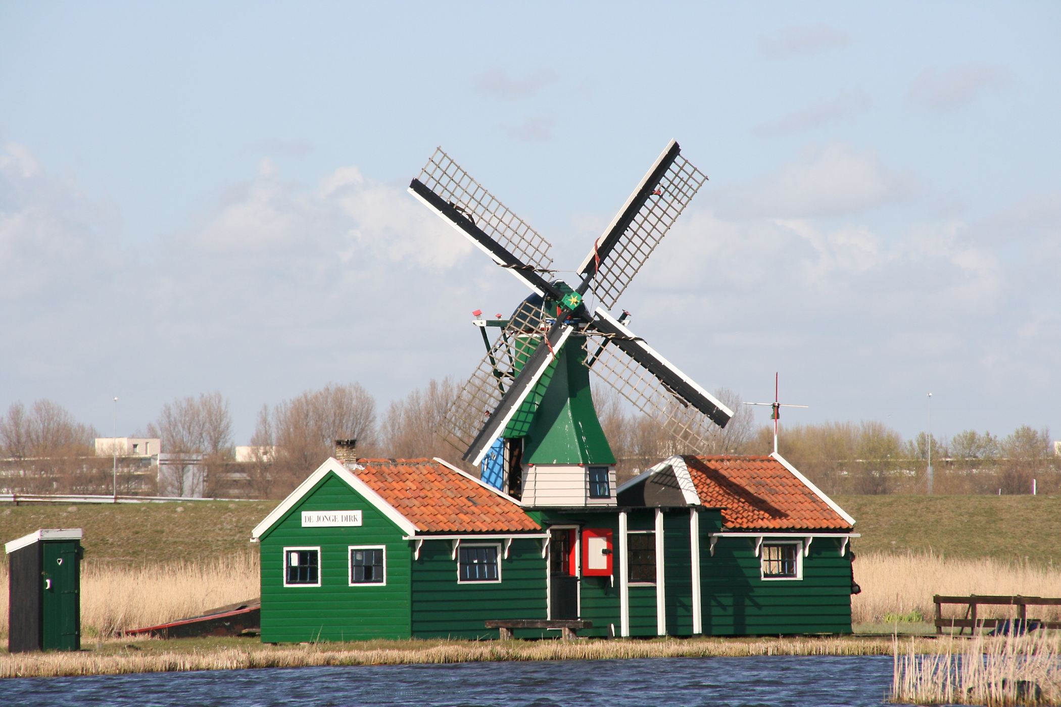 Westzaan: molen De Jonge Dirk